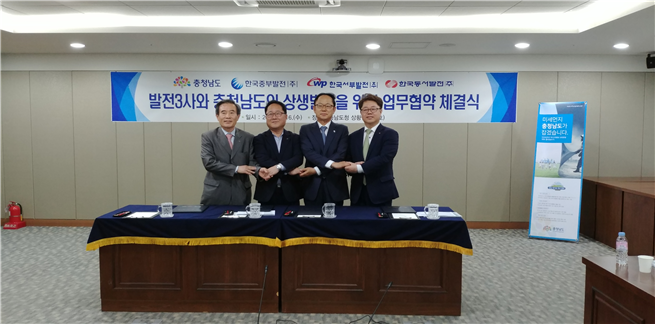 2018. 5. 16. 발전3사-충청남도 상생발전 업무협약식 체결